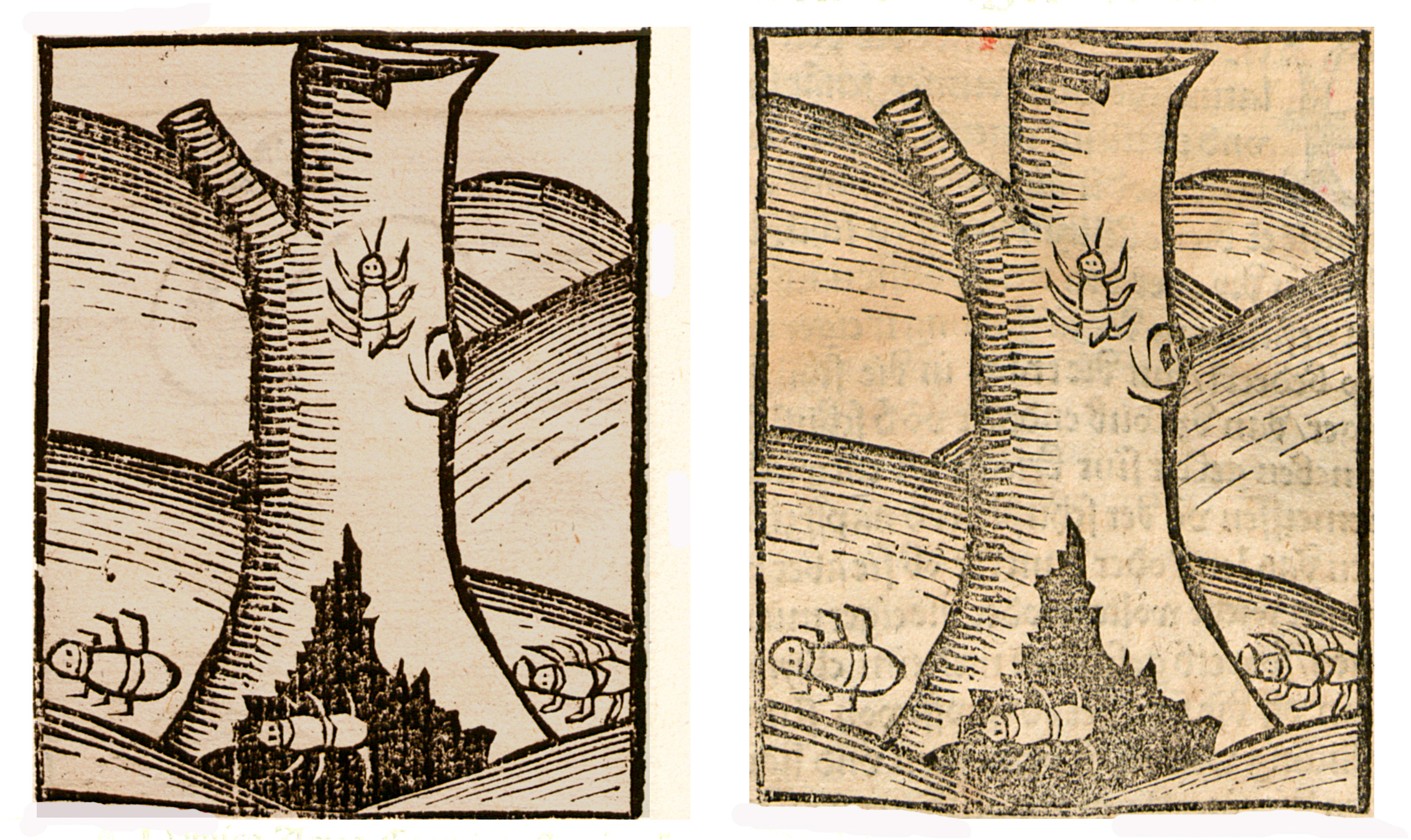 Abbildung von: Ameisen